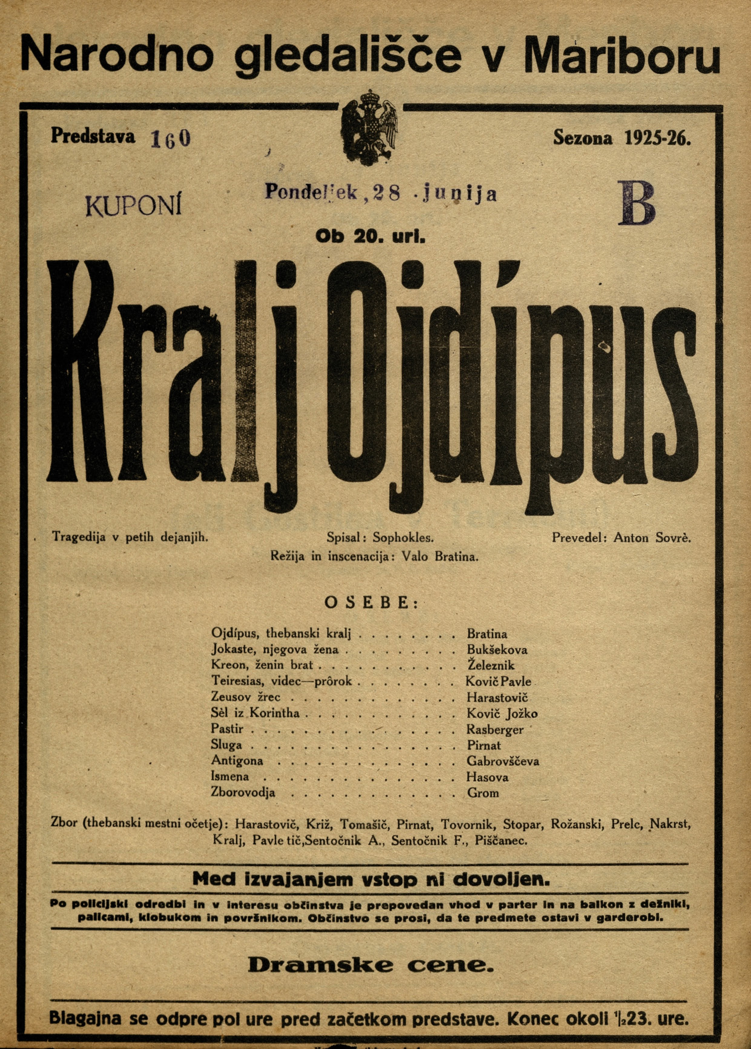 Plakat za predstavo Kralj Ojdipus v Narodnem gledališču v Mariboru.